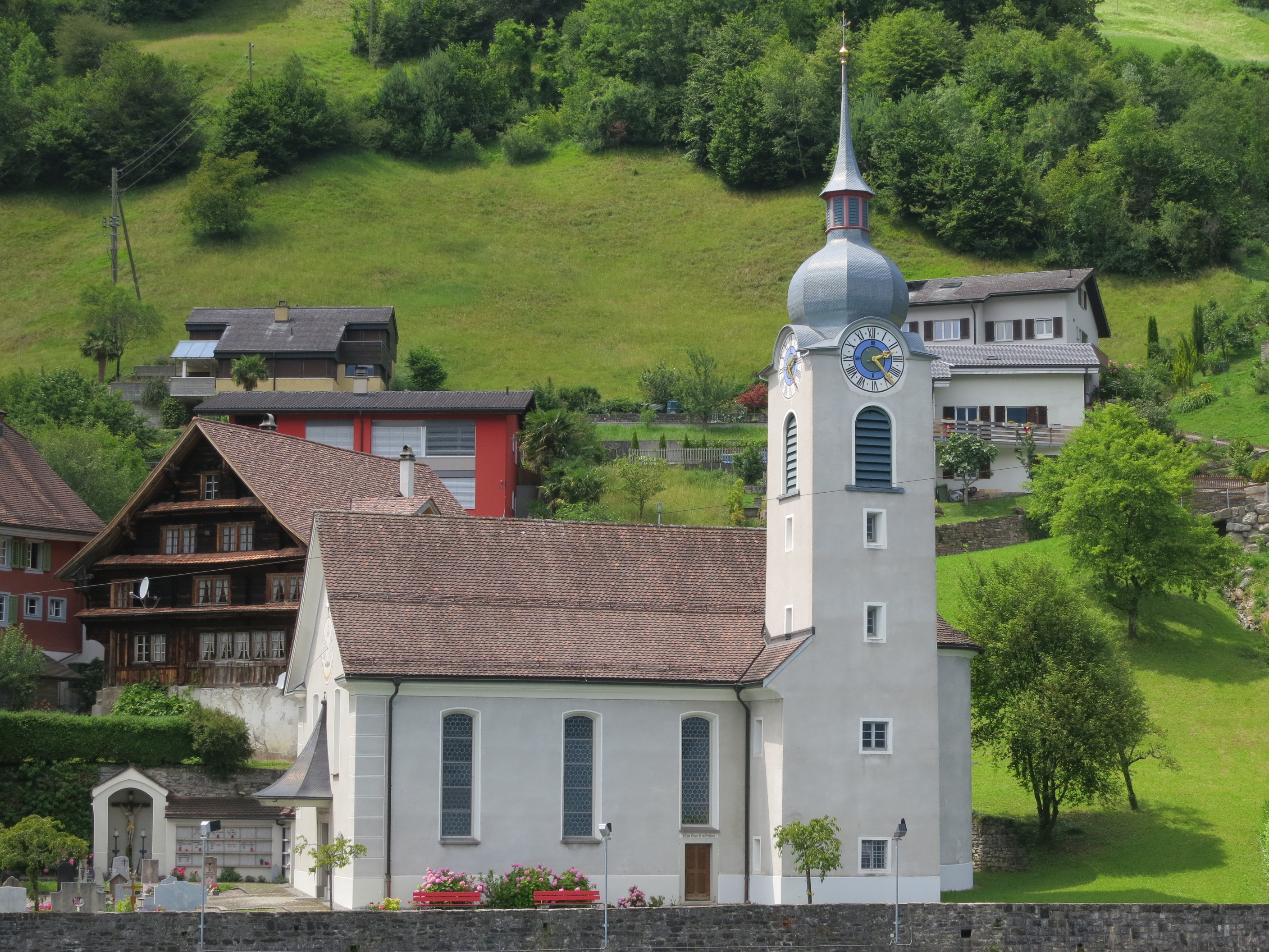 Kirche Bauen UR, Schweiz